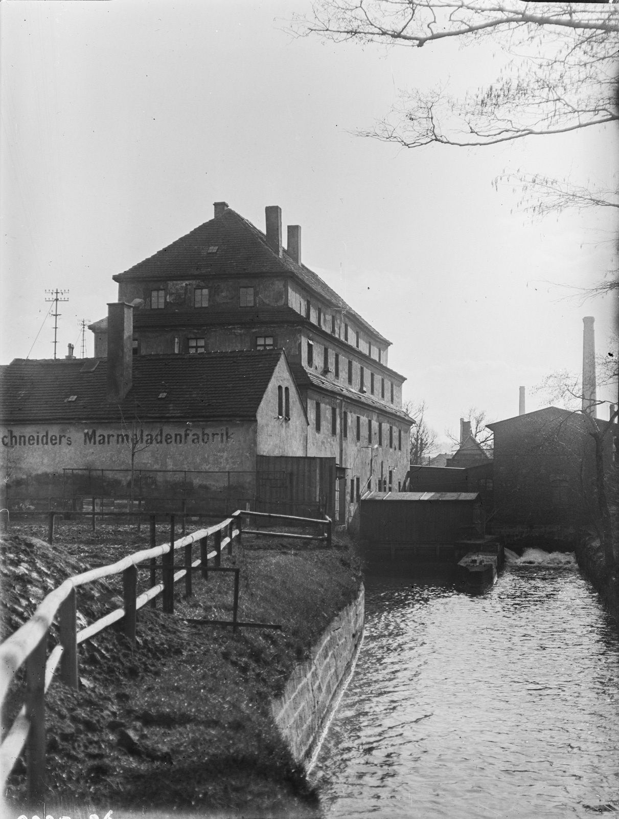 Ehem. Schokoladenfabrik Lippold in Dresden-Löbtau, Am Weißeritzmühlgraben 14 (seit 1887, anstelle der Spiegelschleife und nach 1813 errichteten Spinnmühle), siehe [1].